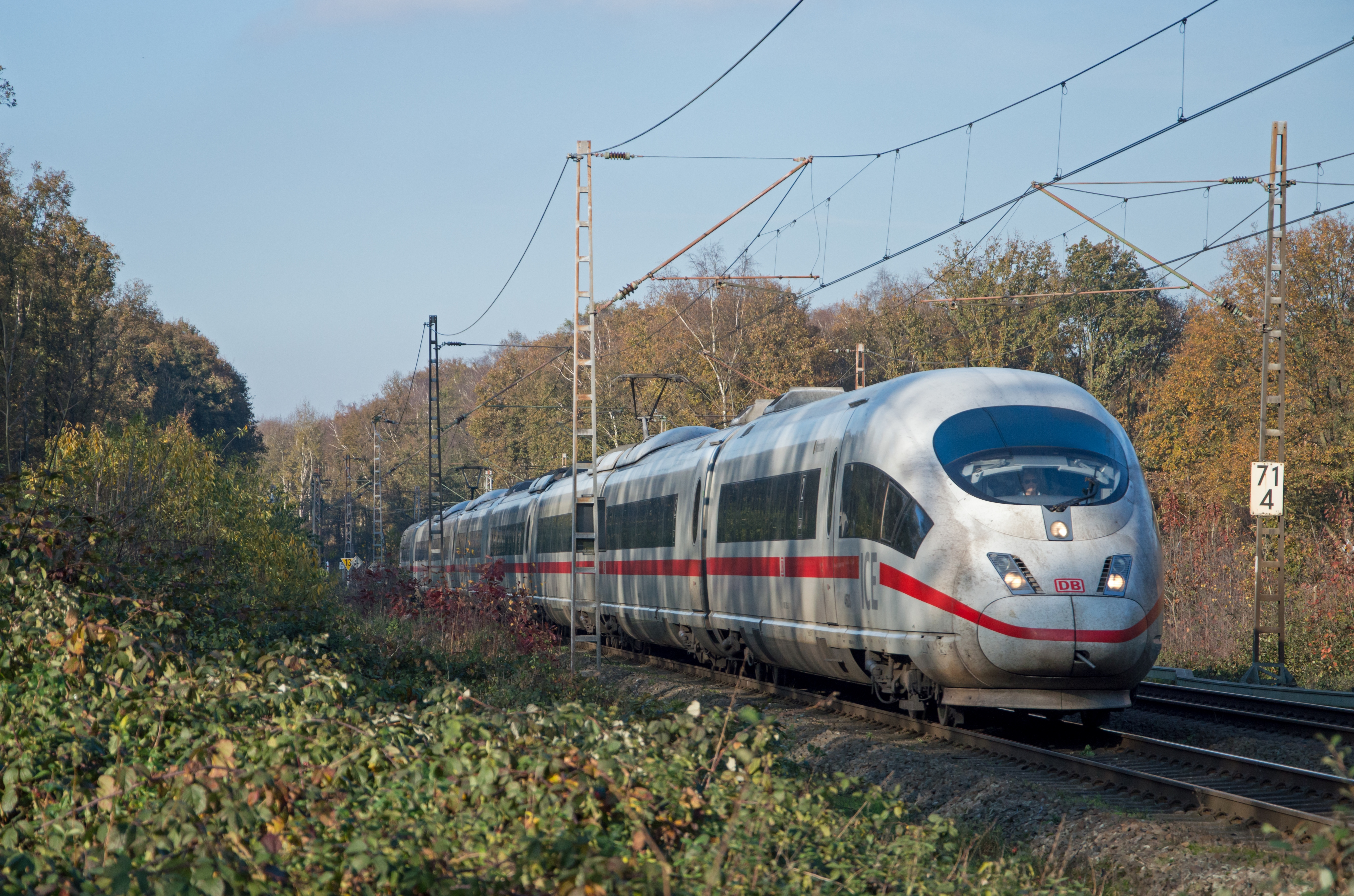 Met nog een lange rit voor de boeg, treinstel 4603, hier bij Elten, Duitsland binnen. Onderweg van Amsterdam als ICE 125 naar Frankfurt/Main Hbf.